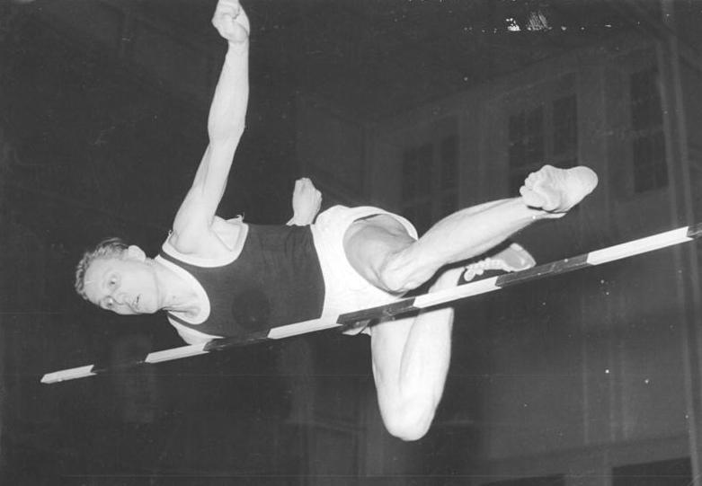 Günther Lein Zentralbild Wlocka 10.3.1957 DDR-Hallen-Leichtathletikmeisterschaften Am Sonnabend, dem 9.3.1957, fand in der Sporthalle der DHfK, Leipzig, die DDR-Hallen-Leichtathletikmeisterschaft statt. Ab internationale Gäste nahen and den Wettkämpfen auch Sportler aus der CSR teil. UBz: Der Leipziger Rotation-Springer Günther Lein belegte im Hochsprung der Männer den zweiten Platz. Lein während des Sprunges.